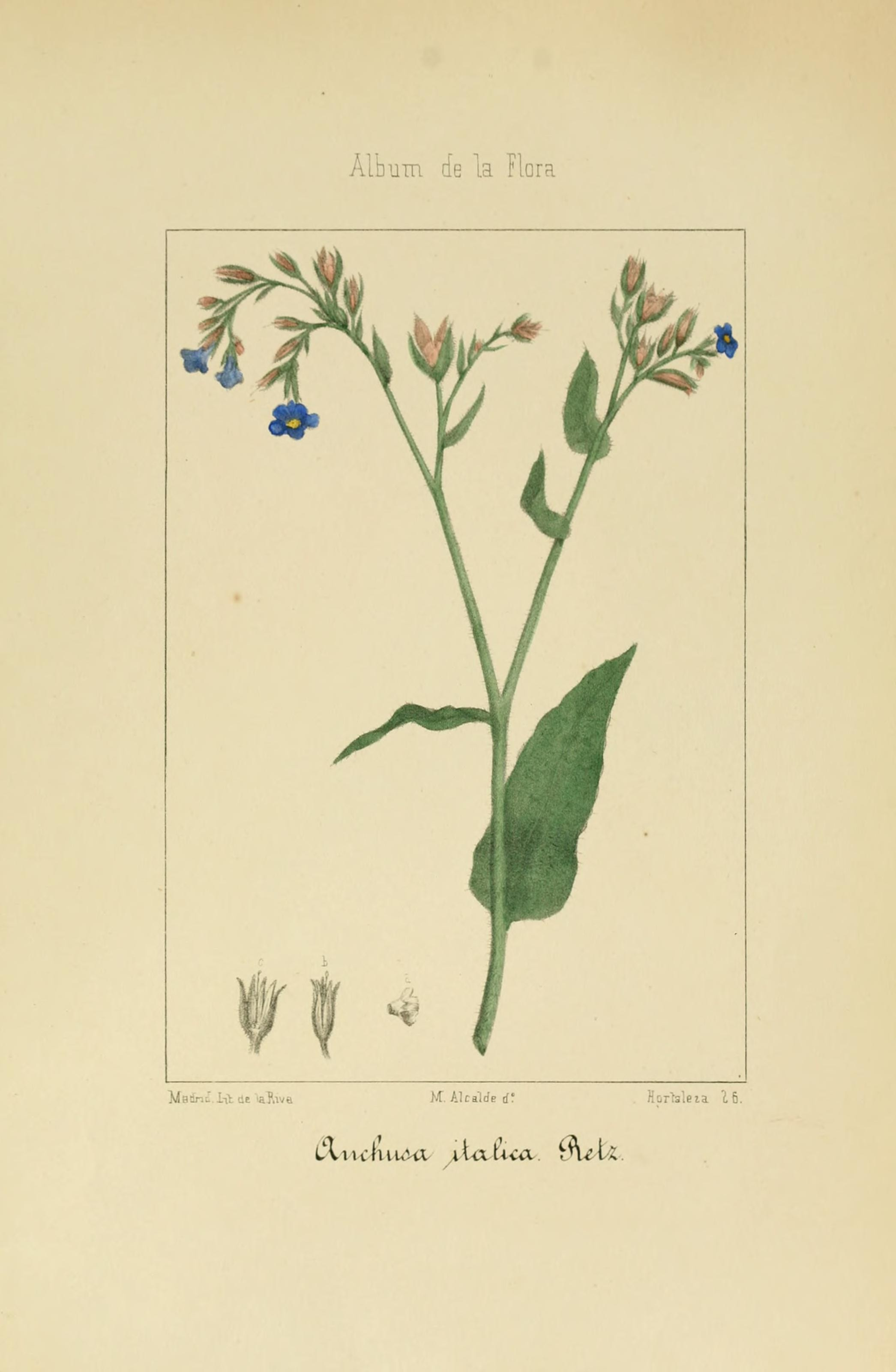 Álbum de la Flora MaínLliY üe 'aí.iva W. Alcalde d? Kcr'rsleía Ib. LA I it la uva AaxÍicíX vle-tí.